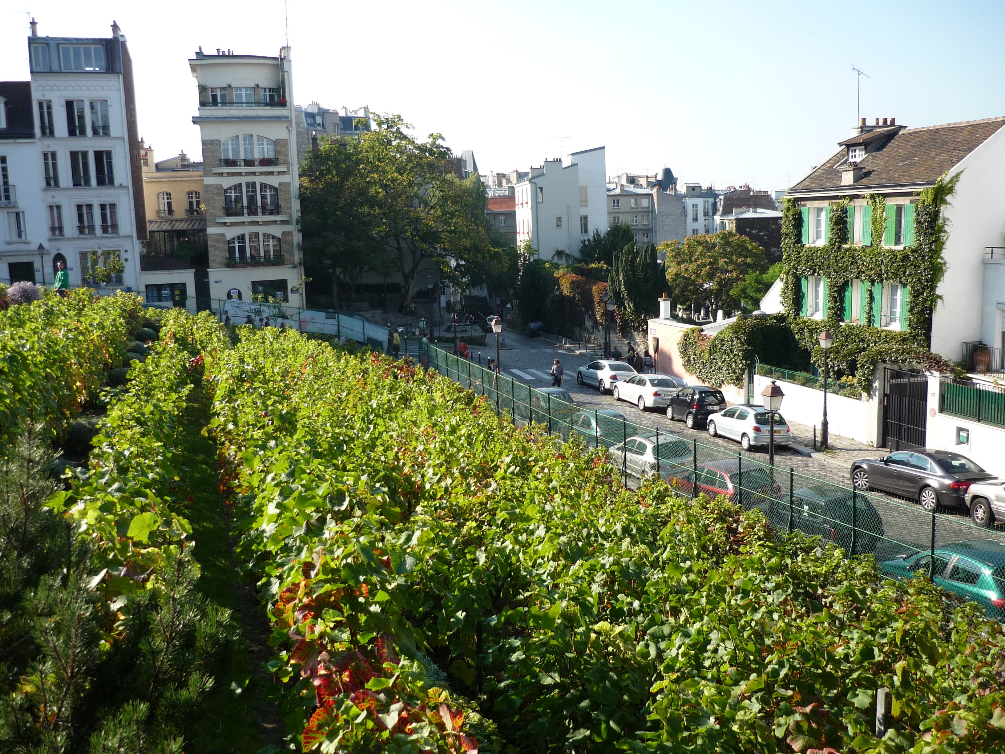 Vue du clos Montmartre, célèbre vigne qui pousse à Paris sur le flanc nord de la Butte Montmartre. Au moment où cette photo a été prise, depuis l'intérieur de la vigne, le jour de la Fête des Jardins, la cueillette du raisin avait eu lieu 15 jours auparavant. Au fond sur la droite, le cabaret du Lapin Agile